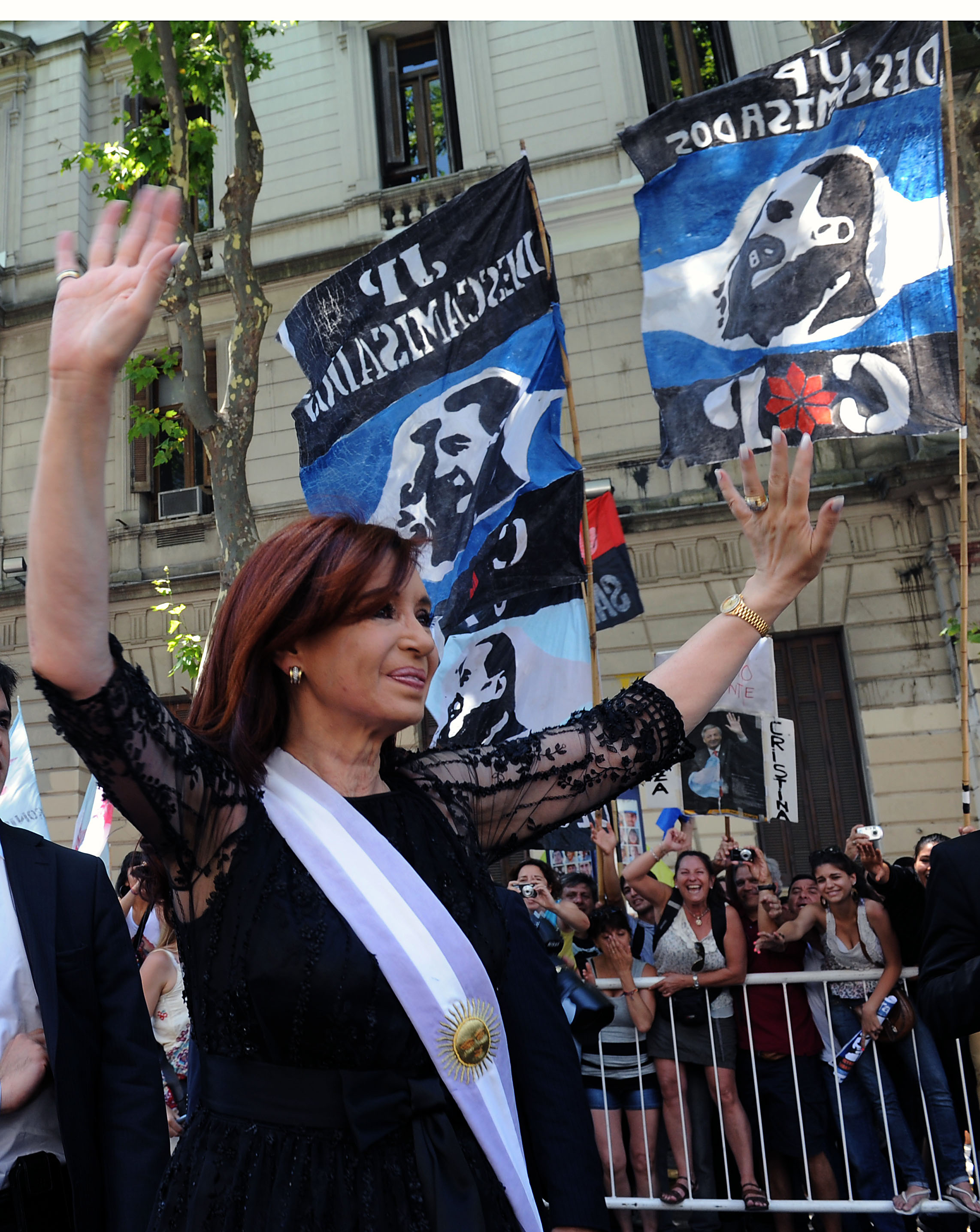 La presidenta Cristina Fernández y el vicepresidente electo, Amado Boudou, prestaron juramento ante la Asamblea Legislativa.